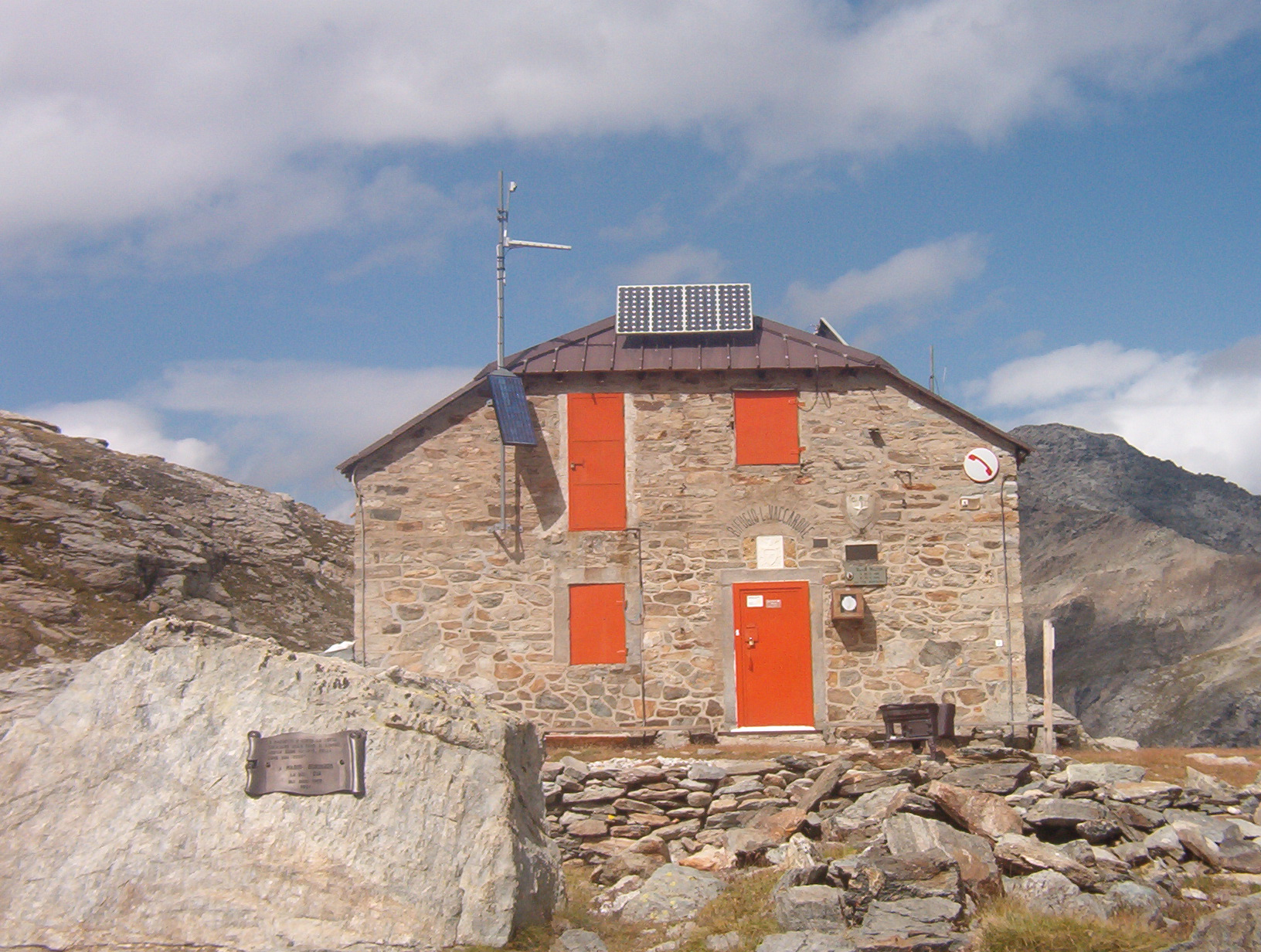 Rifugio Luigi Vaccarone - Valle di Susa - Alpi Cozie - Piemonte - Italia